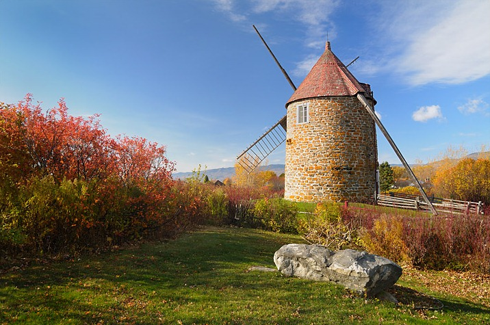 Moulin à vent de l'économusée sur l'Isle-aux-Coudres, région de Charlevoix, Québec